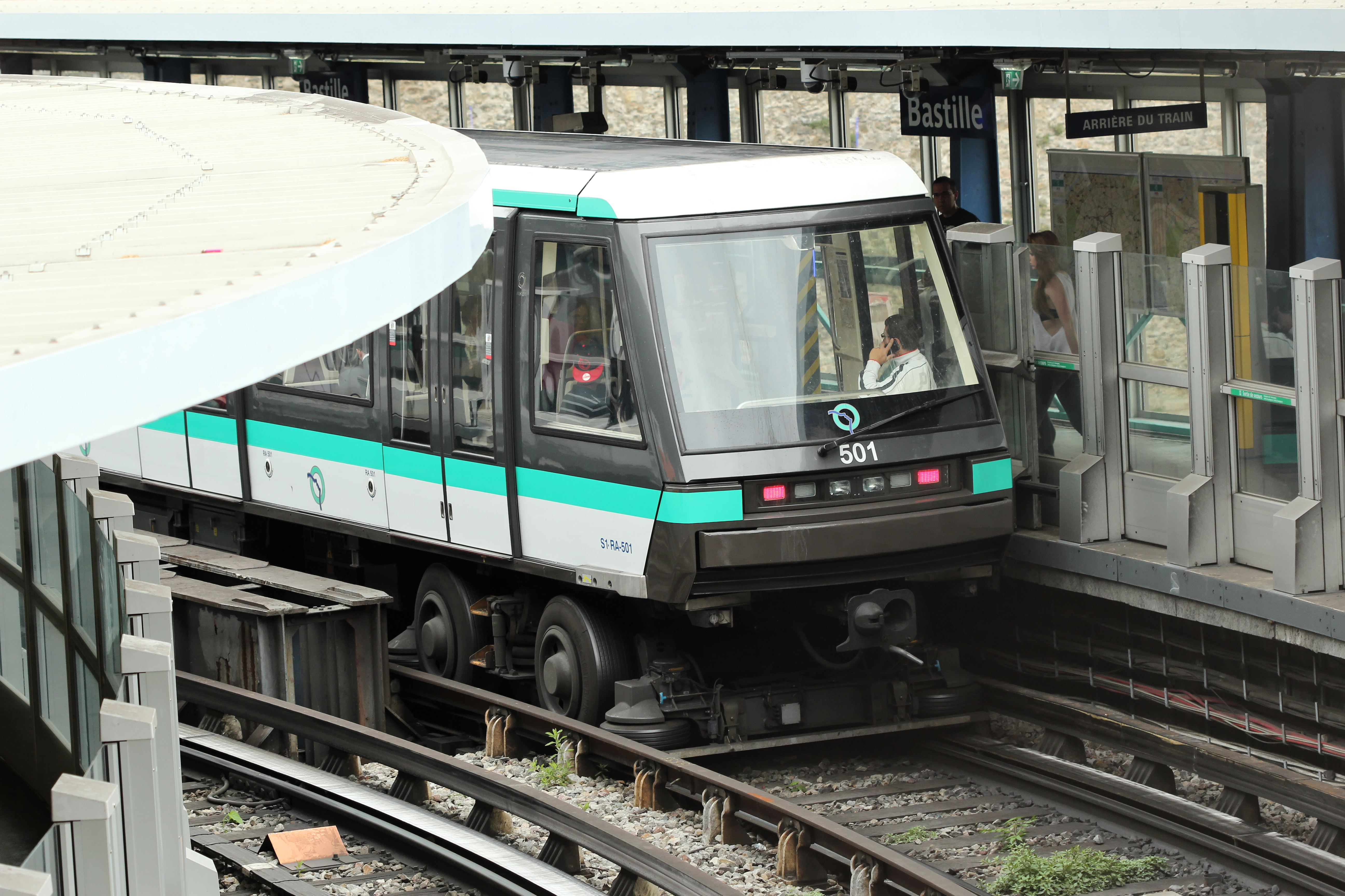 Station de métro Bastille, ligne 1.